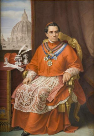 ANTONELLI GIACOMO